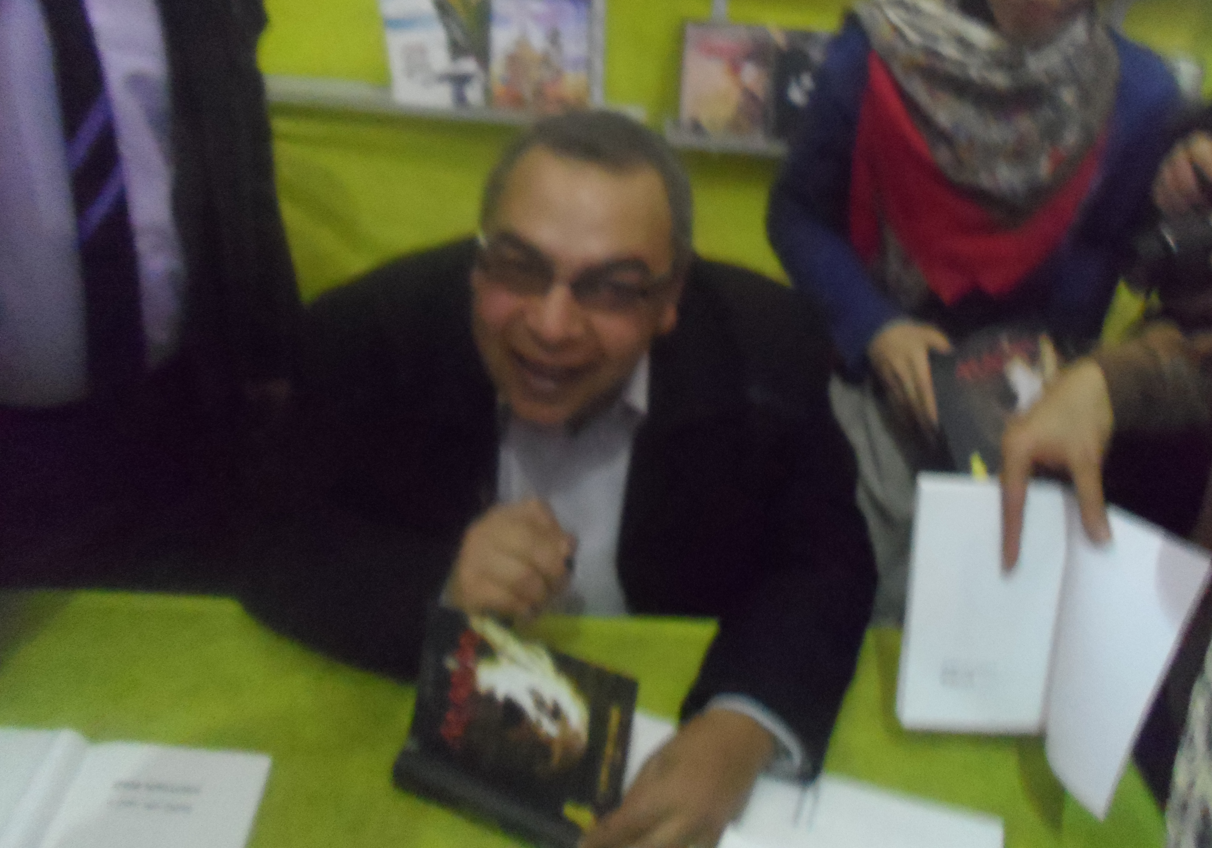 الأديب أحمد خالد توفيق